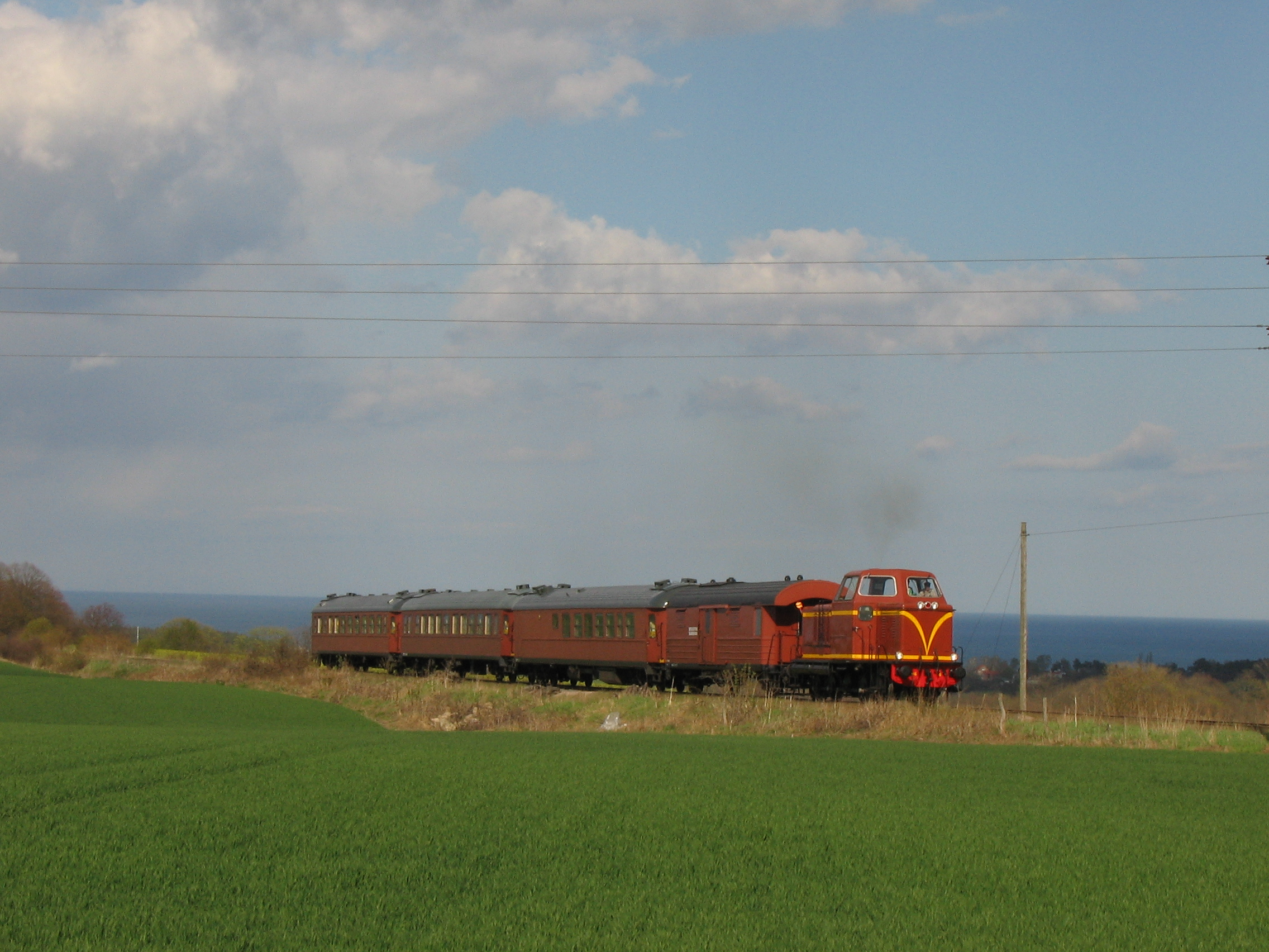 Skånska Järnvägar och Nässjö Järnvägsmuseum under en charterresa våren 2005. Utsikt på sträckan mellan Vitaby och Ravlundabro.